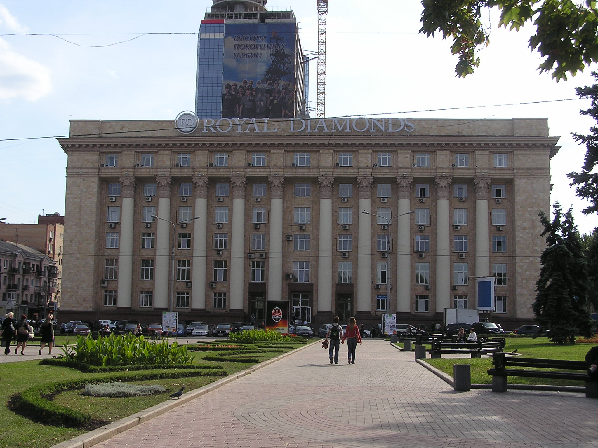 Площадь Ленина в Донецке